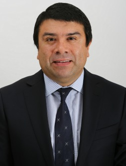 Carlos Cristian Campos Jara